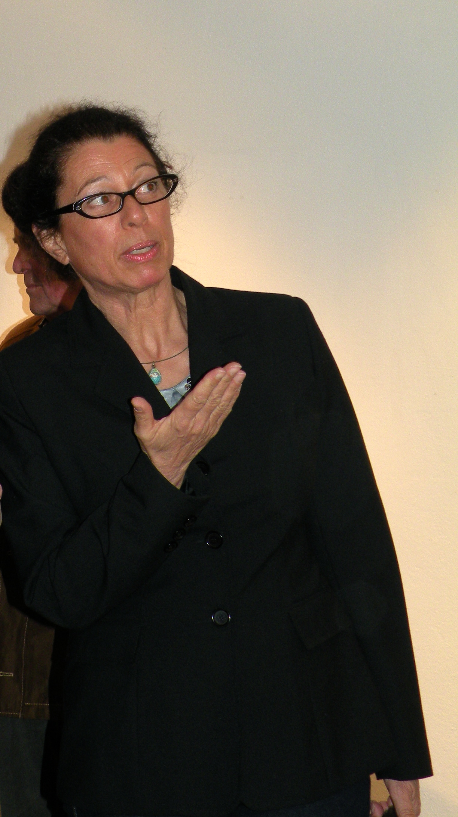 Eva Moosbrugger, österreichische Malerin und Bildhauerin, Glaskünstlerin